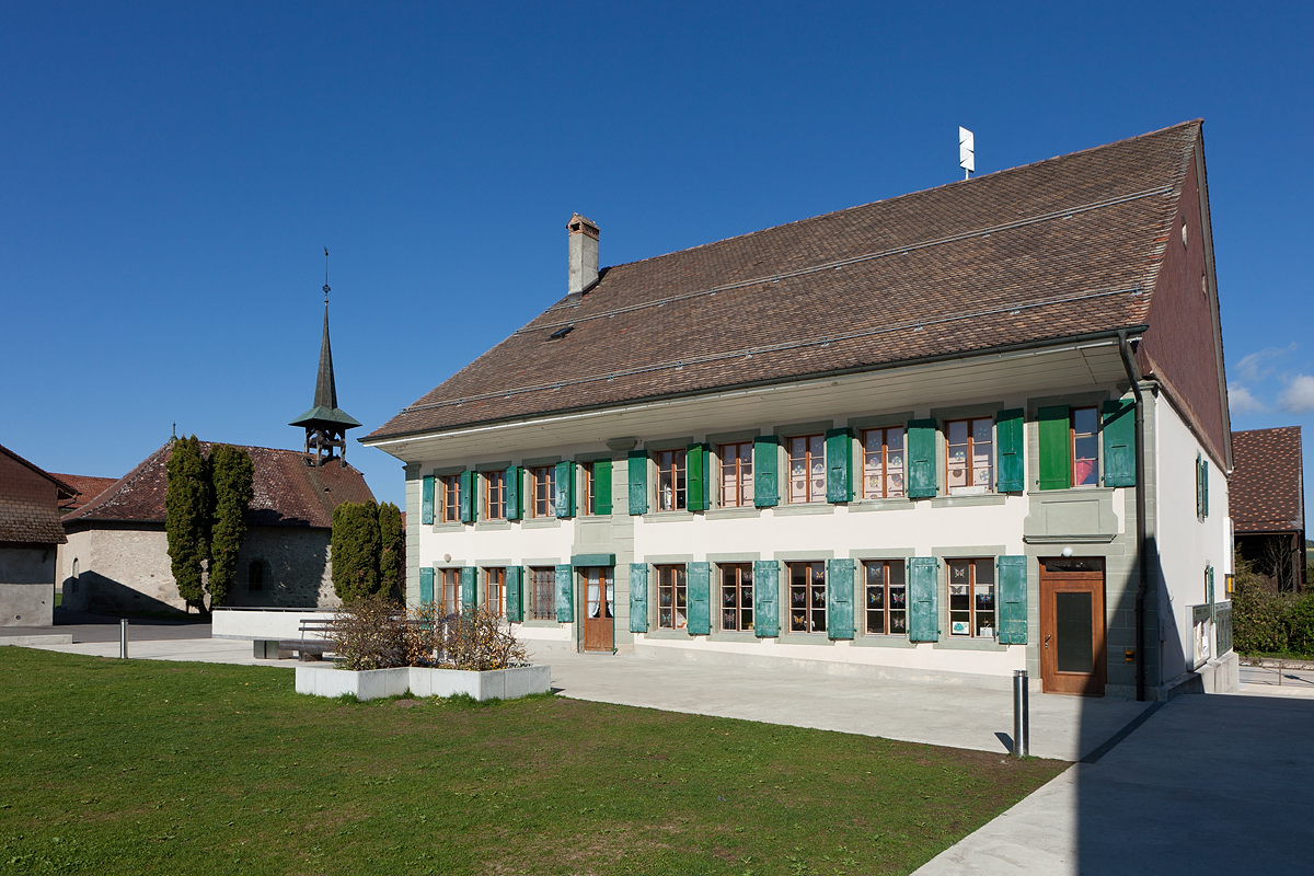 Chapelle et Collège de Carrouge (VD)